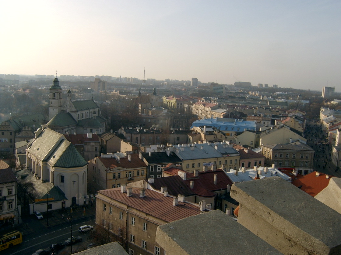 Sicht über Lublin vom Turm Wieża Trynitarska